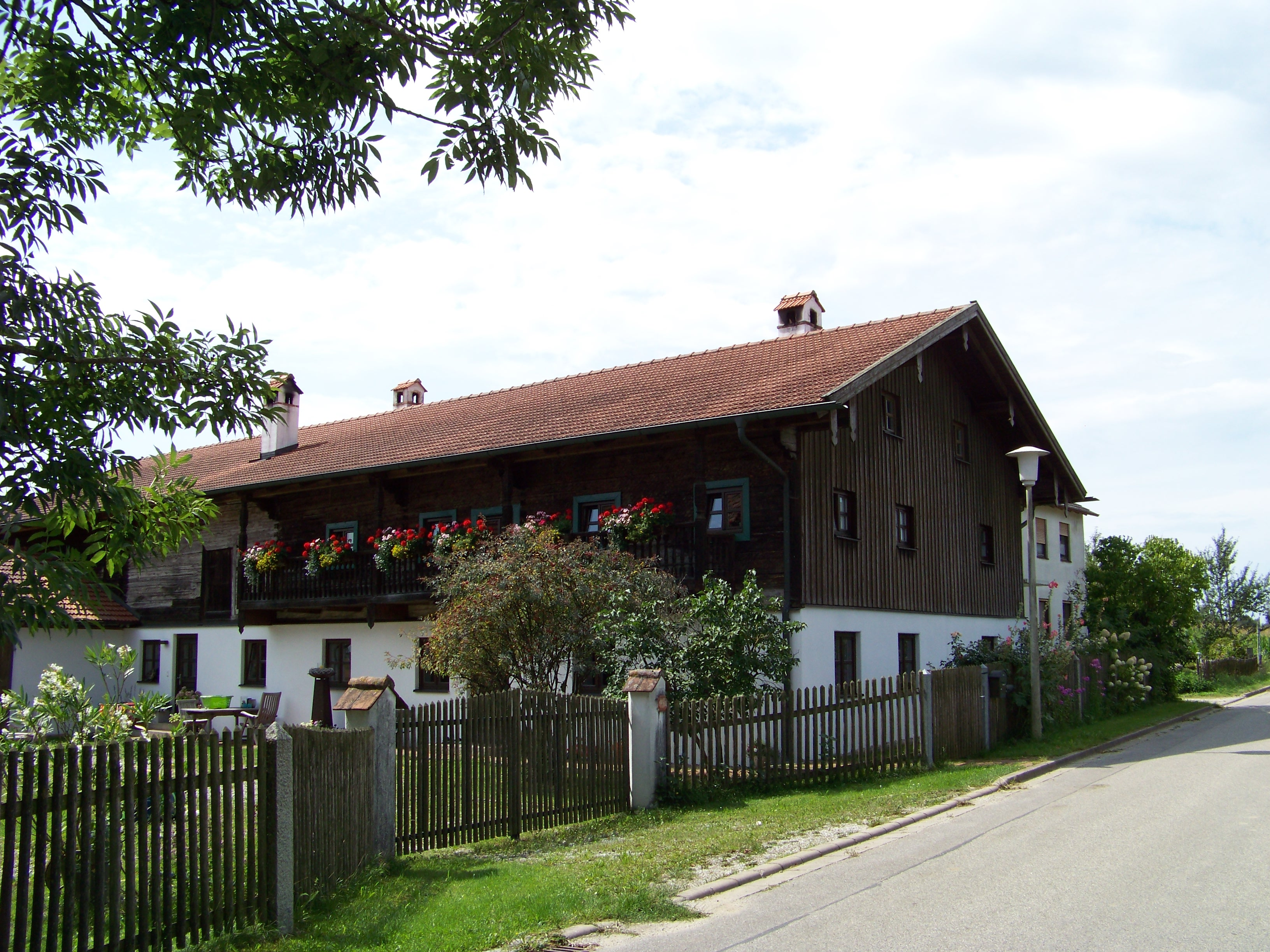 Adlkofen, Engkofen 23. Ehemaliges Wohnstallhaus mit Blockbau-Obergeschoss, Traufseitschrot, flach geneigtem Satteldach und Zierformen, um 1800/1820.